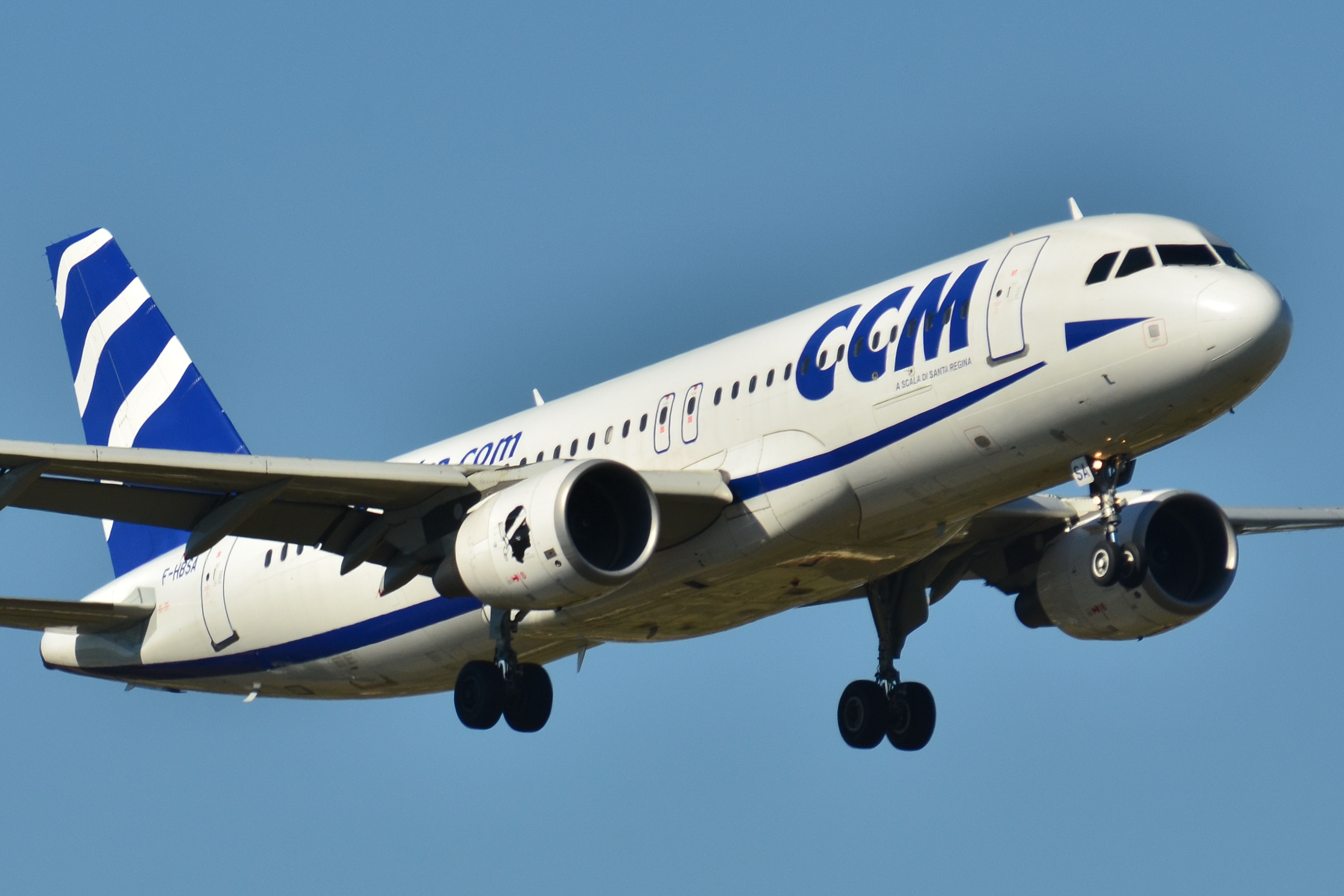 Photo prise à l'aéroport de Toulouse-Blagnac (LFBO) en France. Picture take at Toulouse-Blagnac Airport (LFBO) in France.